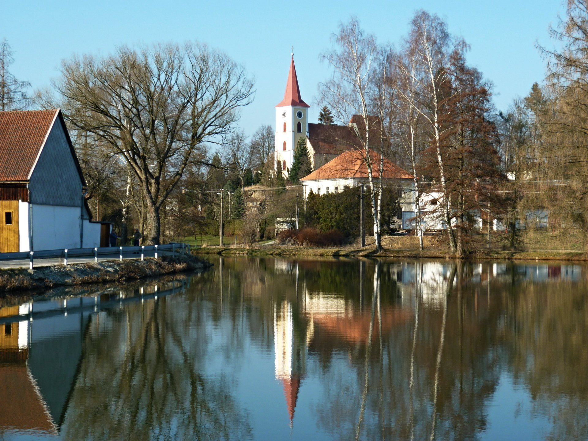 Kostelní Radouň - návesní rybník